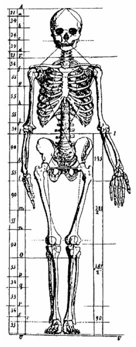 Squelette à vocation anatomique dont les proportions sont calculées à l'aide du nombre d'or